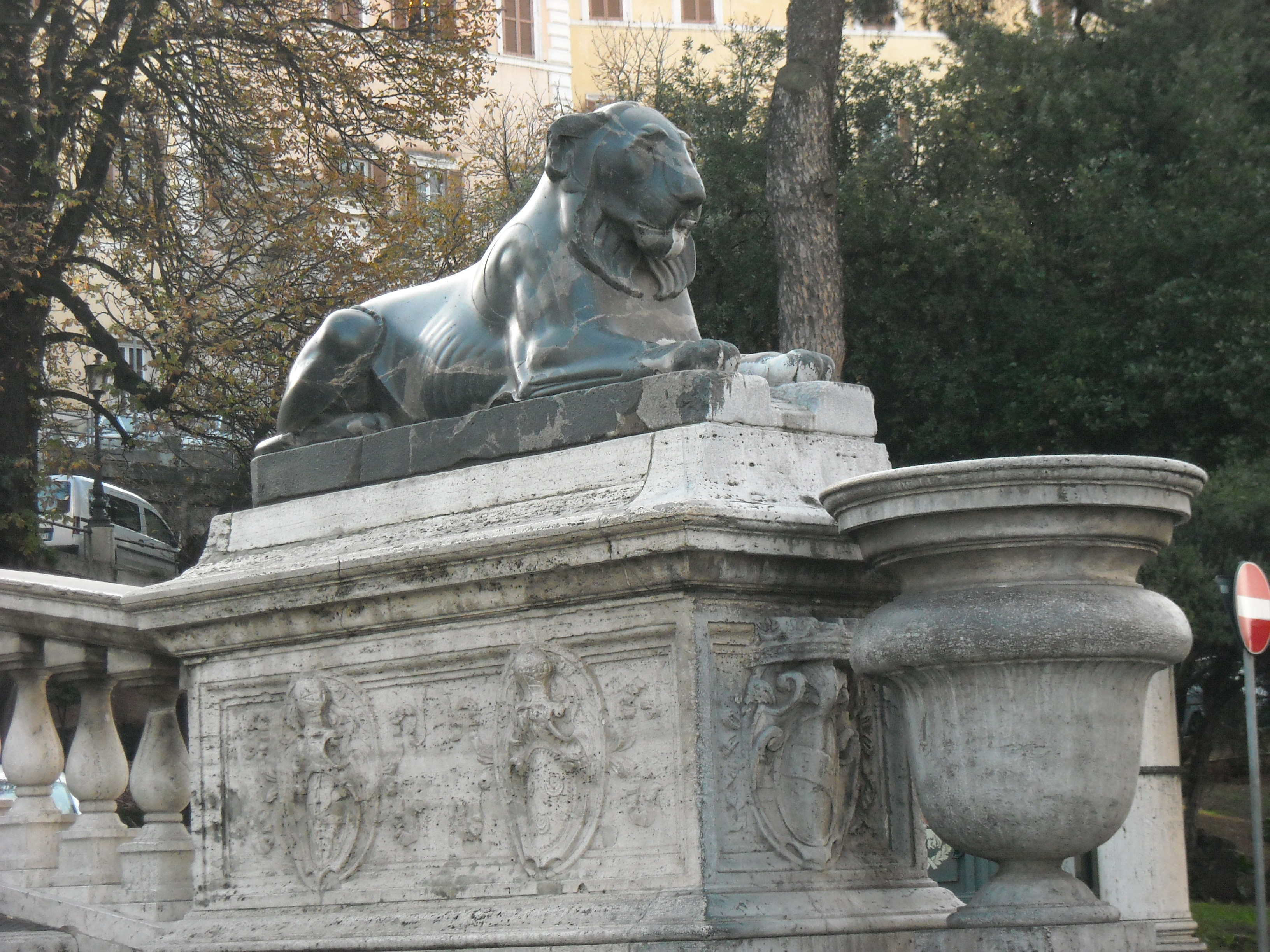 Cordonata (Roma) - Uno dei leoni egizi alla base